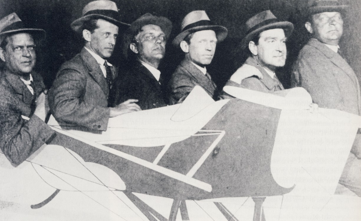 Svenska arkitekter 1931, från vänster: Sven Markelius, Uno Åhrén, Gunnar Asplund, Eskil Sundahl, Wolter Gahn och konsthistorikern Gregor Paulsson